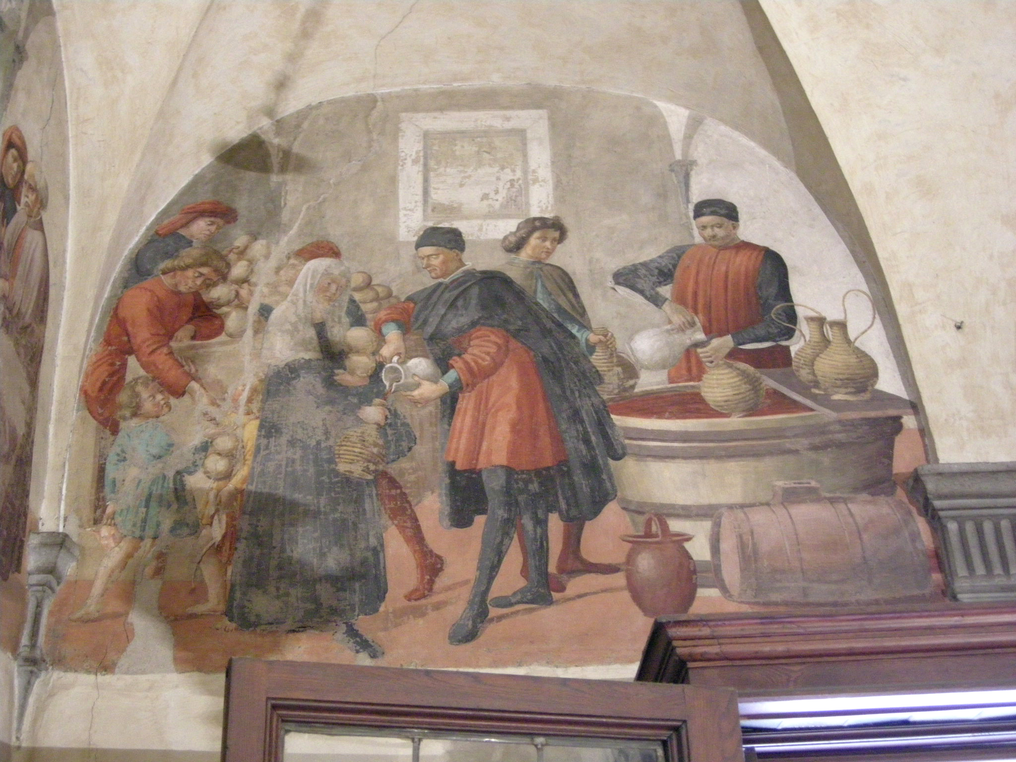 Oratorio dei buonomini di s. martino, lunette di Francesco d'Antonio, dar da bere agli assetati